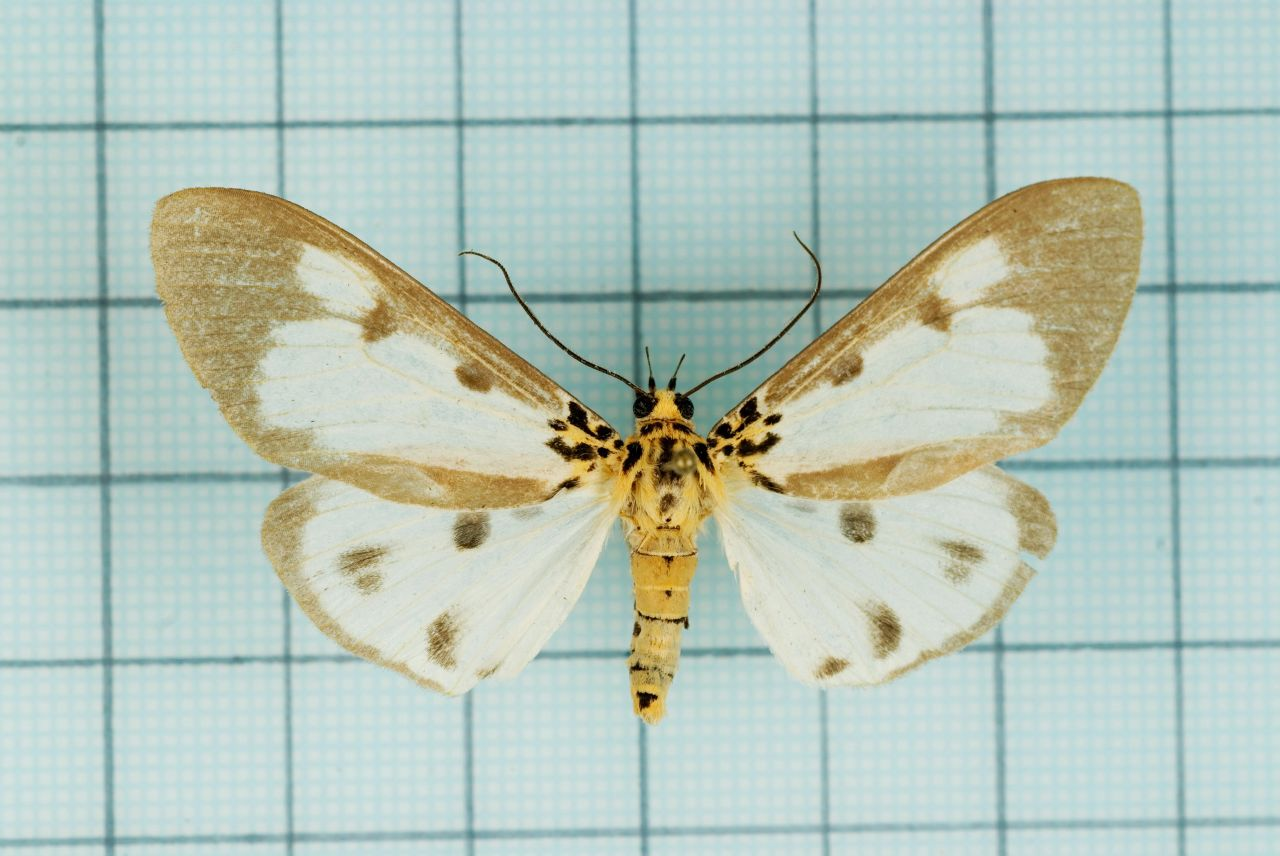 Asota plana lacteata (Butler) 長斑擬燈夜蛾 鞍1:P.63,Pl.15-4 female